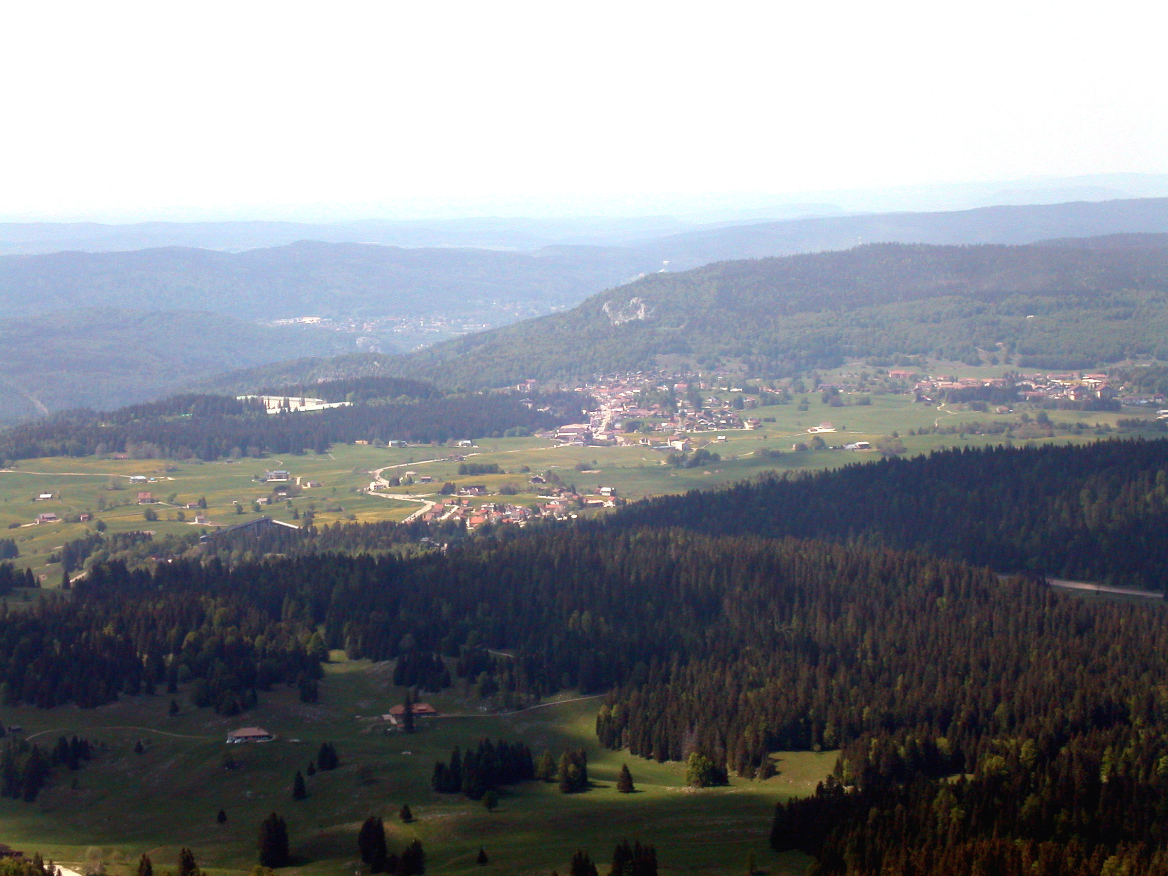 Photograph of Les Rousses looking toward La Dôle, entitled "Les Rousses vues de La Dôle"